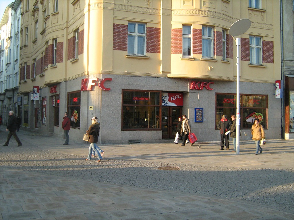 KFC restaurant in Ostrava